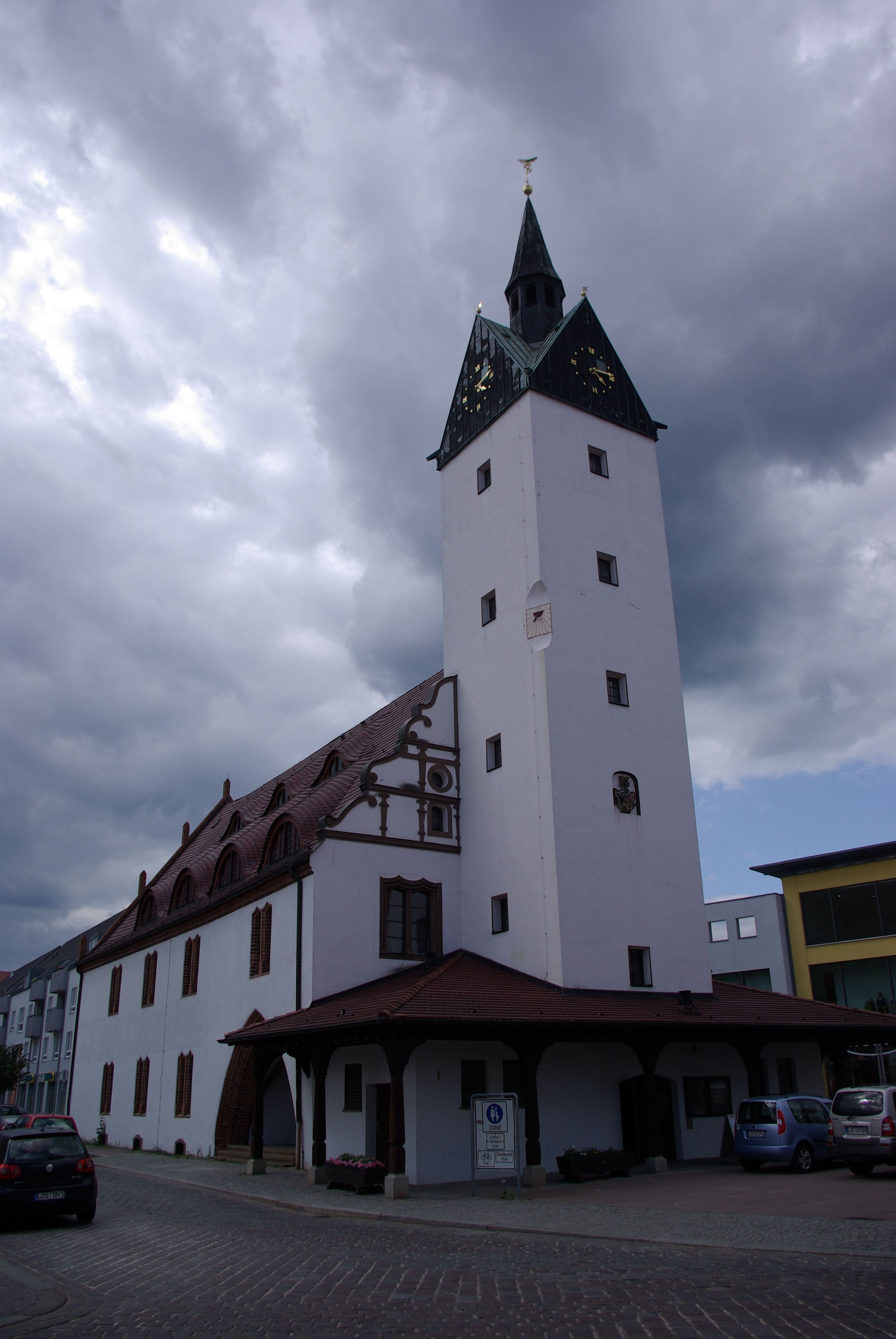 Fürstenwalde/Spree in Brandenburg. Das Rathaus stammt aus der Zeit um 1500. Es ist denkmalgeschützt.